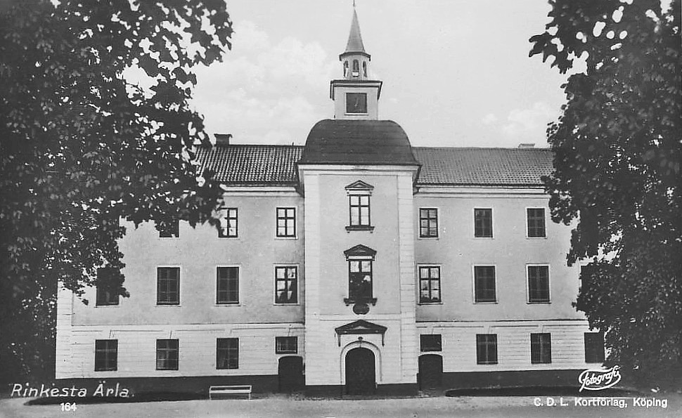 Rinkesta slott, huvudfasad